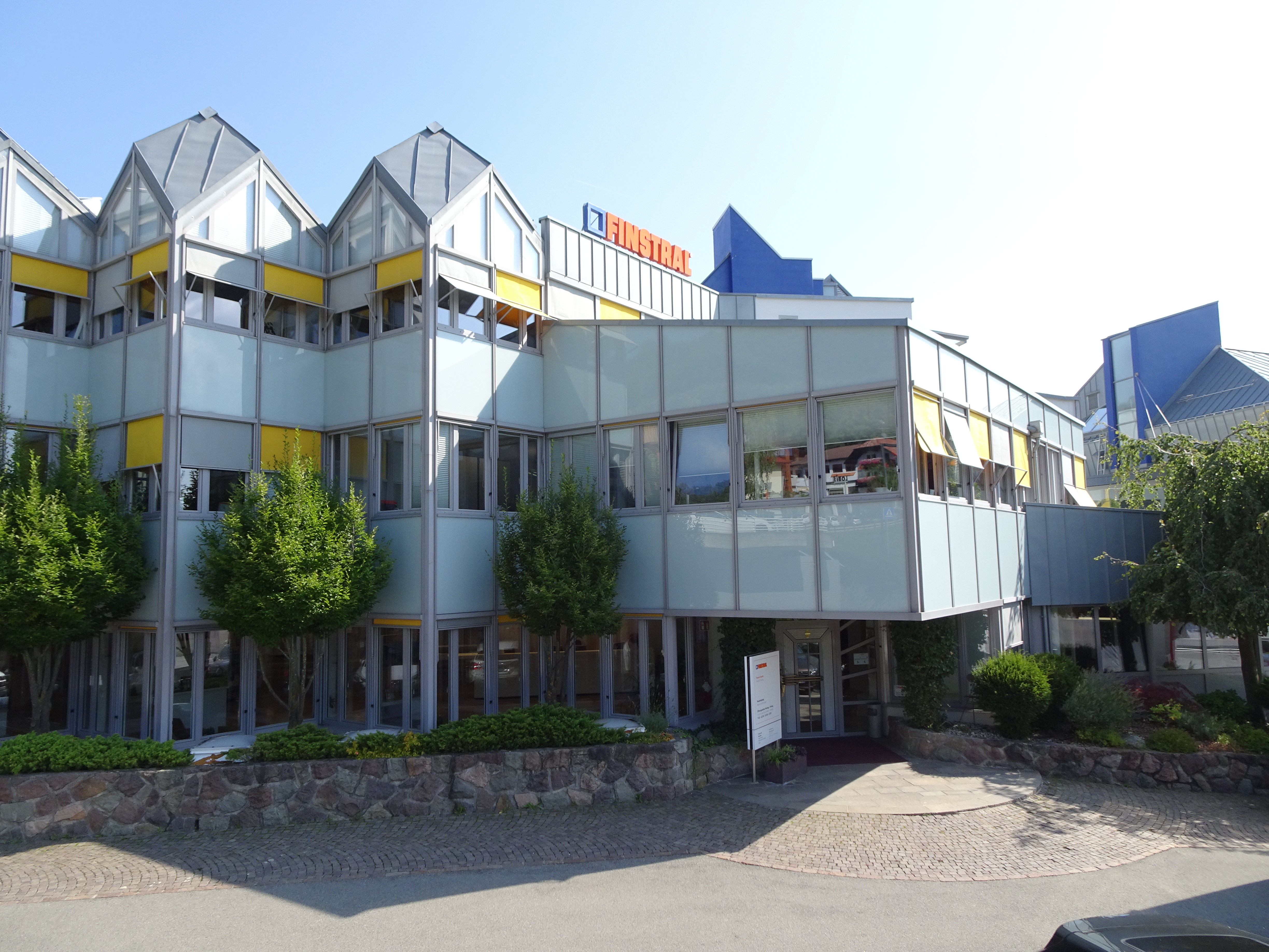 Stammsitz der Firma Finstral in Unterinn bei Bozen